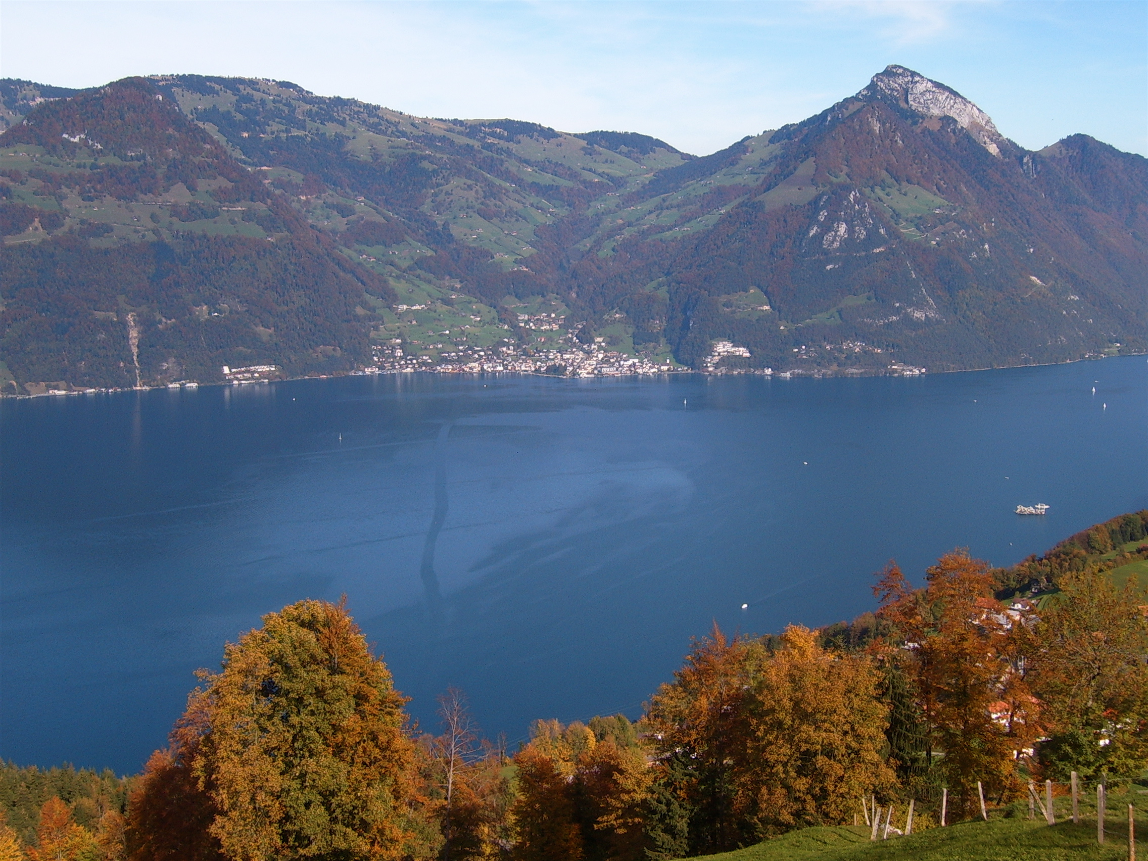 Gersau, seen from Emmetten (Lake Lucerne, Central Switzerland)